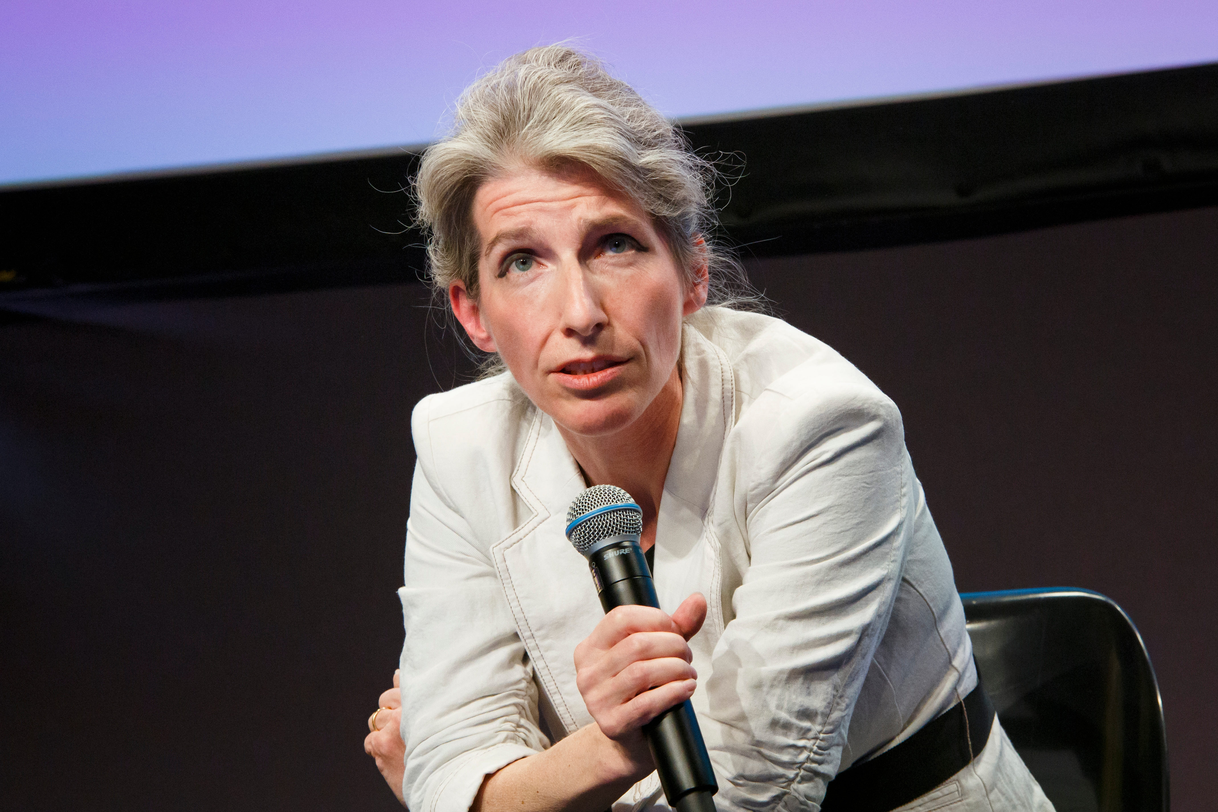 Session: Wie weiter mit der Datenpolitik? Speaker: Ingo Dachwitz, Christiane Wendehorst, Christiane Woopen